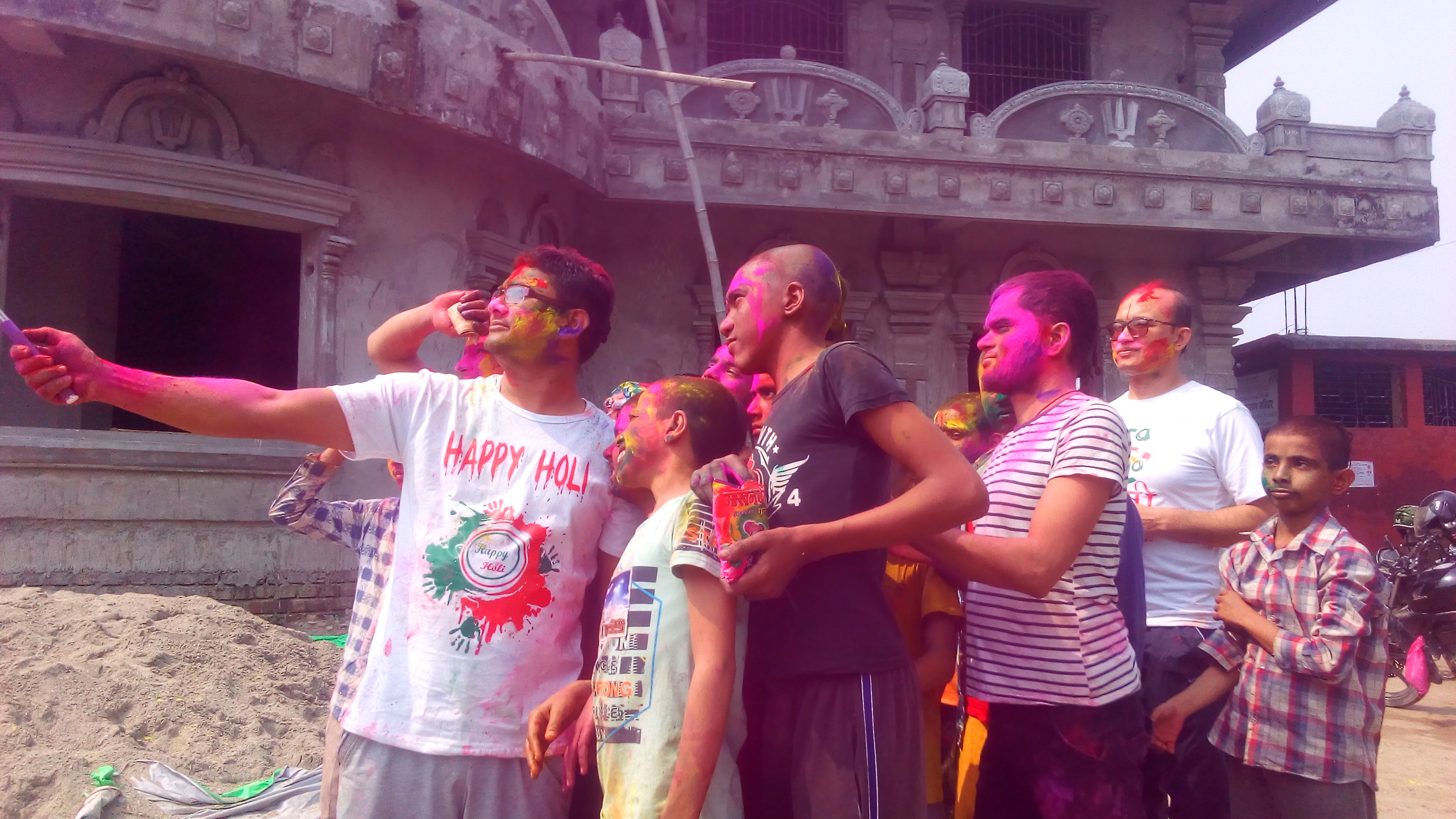 नेपाली: होली २०७४ नेपाल बिराटनगर